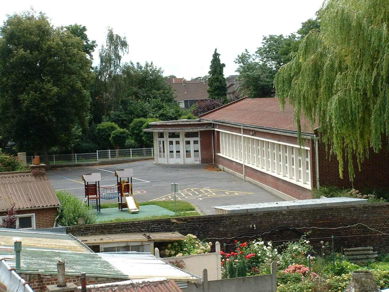 école maternelle Jean Jaurès à Anzin (Nord, France)